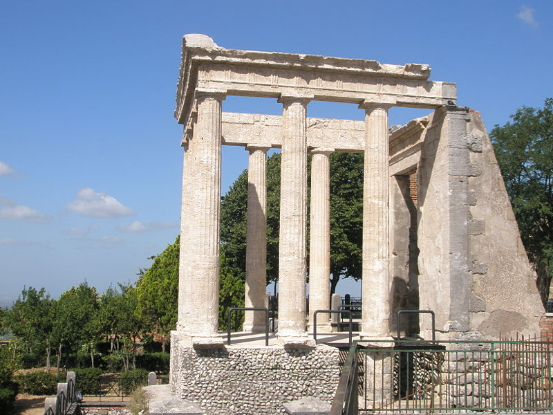 Tempio Ercole a Cori, LT